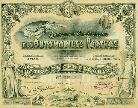 Eng Porthos Aktie Source:Archiv Cornischong